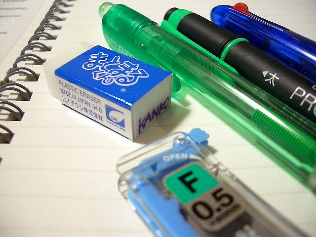 いつも使う消しゴムは、MONOなんだけど...＾＾